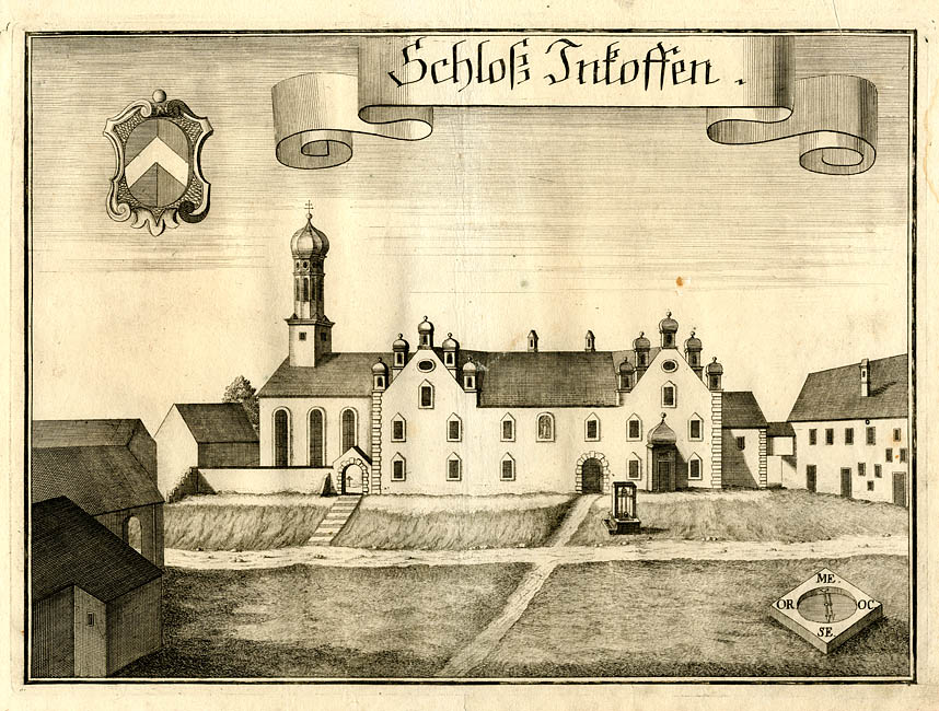 “Schloß Inkoffen.” (Schloß Inkofen, Markt Schierling), aus : Beschreibung des Churfürsten- und Hertzogthumbs Ober- und Nidern Bayrn. – Rentamt Landshut, Gericht Kirchberg, 1723